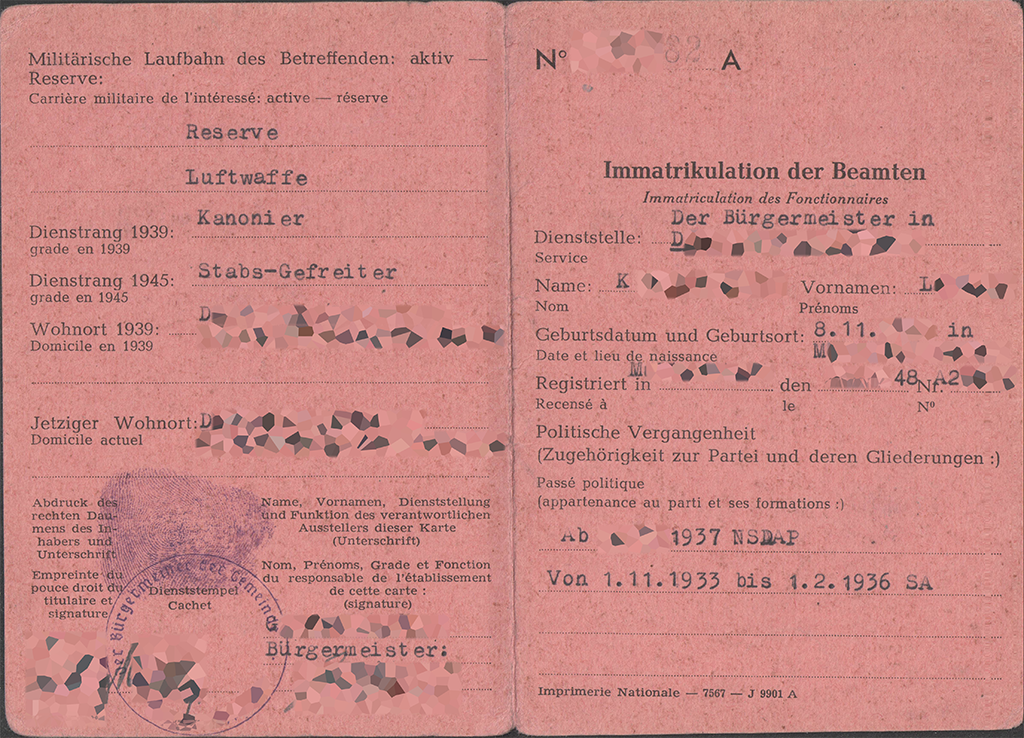 Immatrikulationskarte der Beamten, hier für einen Kommunalbeamten in Rheinland-Pfalz, mit Vermerk der Entscheidung der französischen Bereinigungskommission (Entnazifizierung). Klappkarte mit Einlegeblatt, Außenseiten.